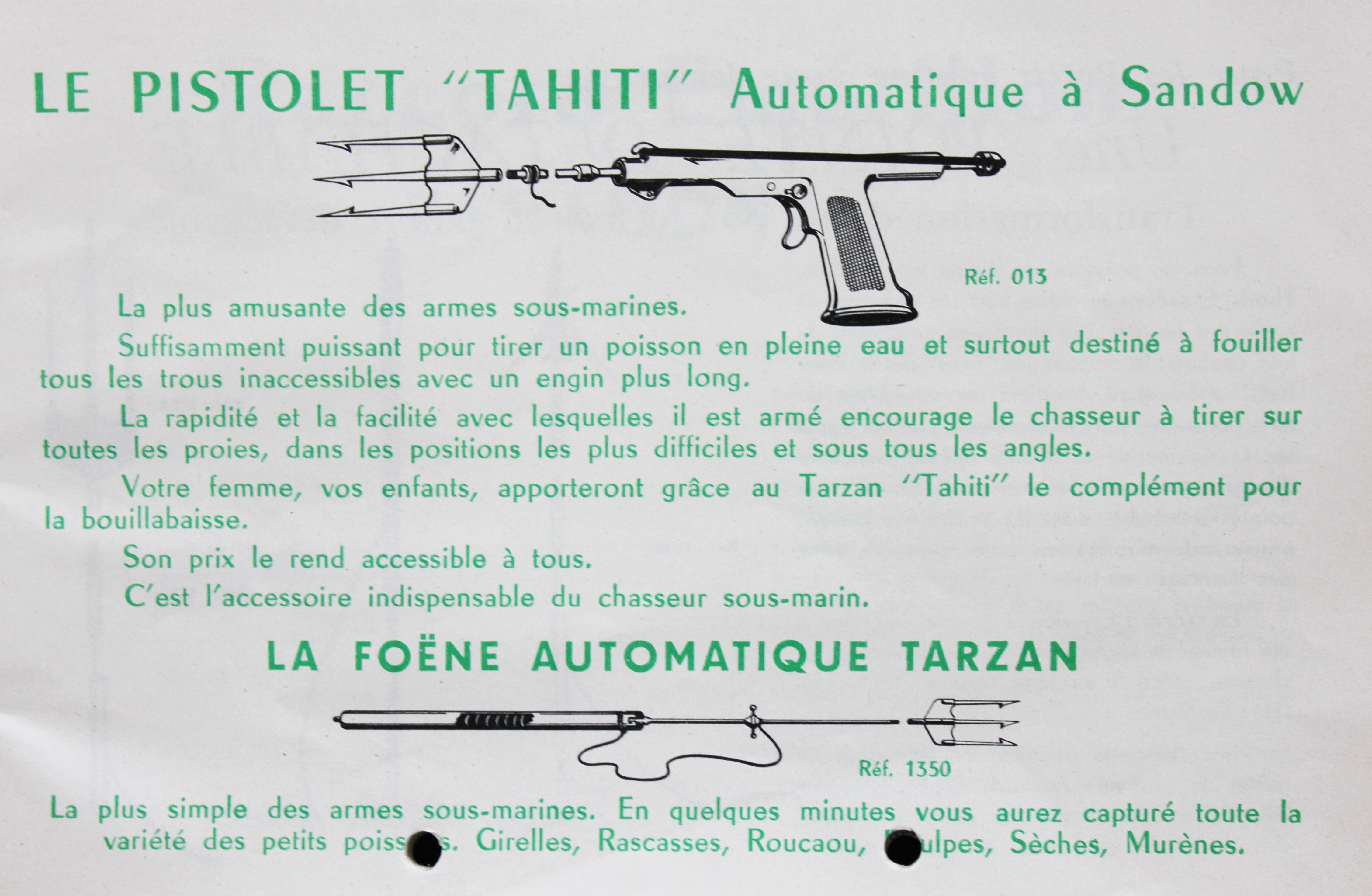 Catalogue Beuchat